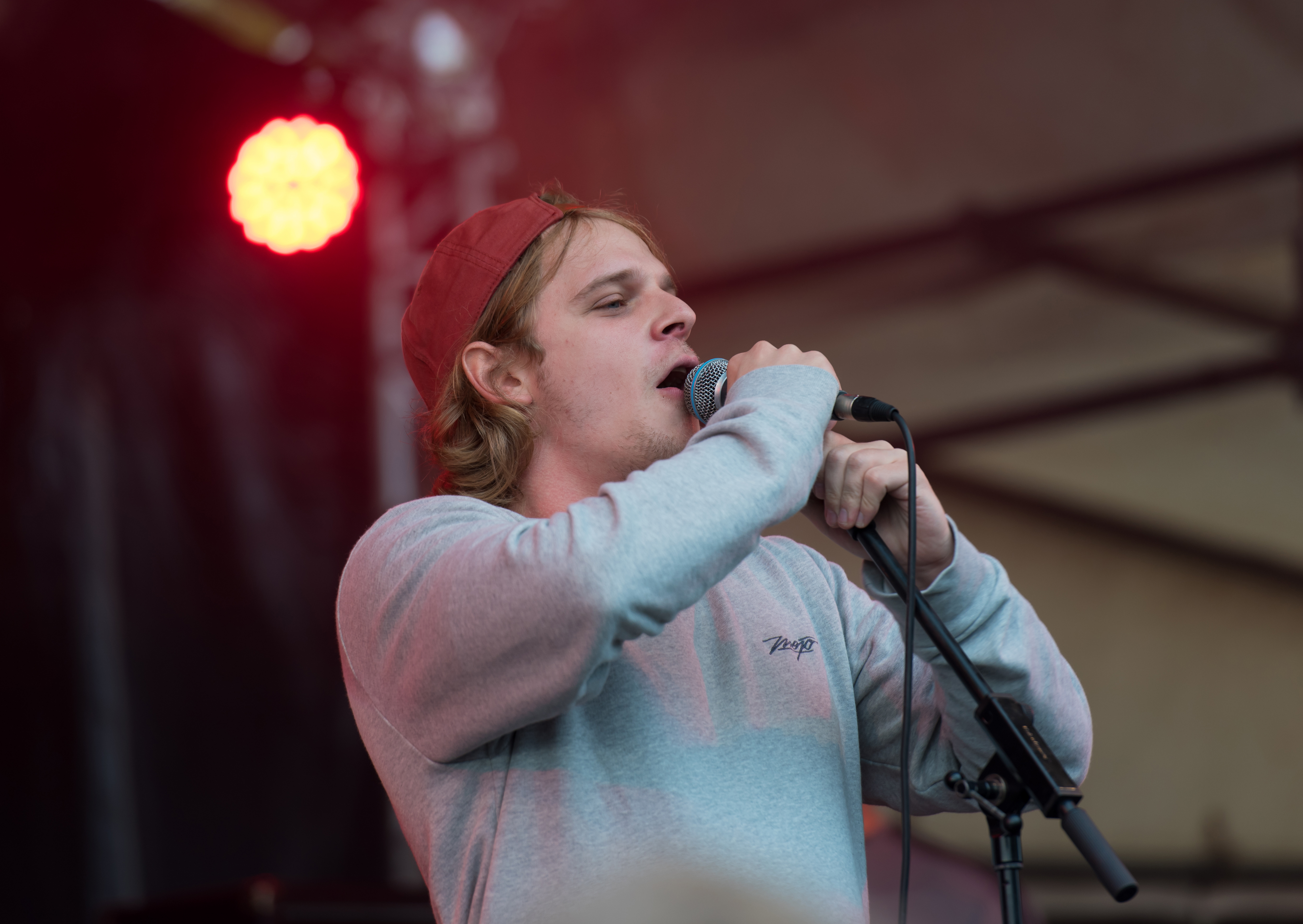 Goldroger live beim Ackerfestival 2017